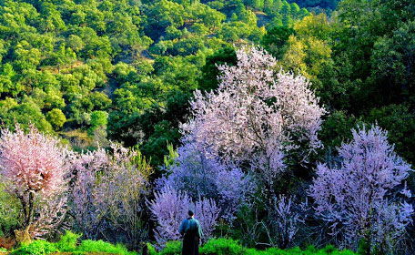 Shinrin Yoku bosque Samurai Spain